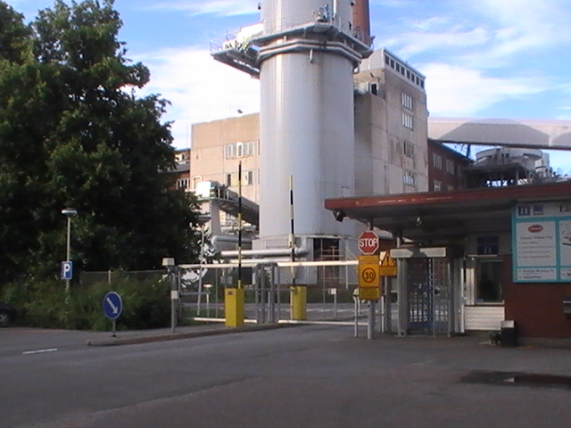 Description